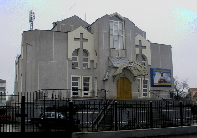 Церква Адвентистів сьомого дня в місті Одеса